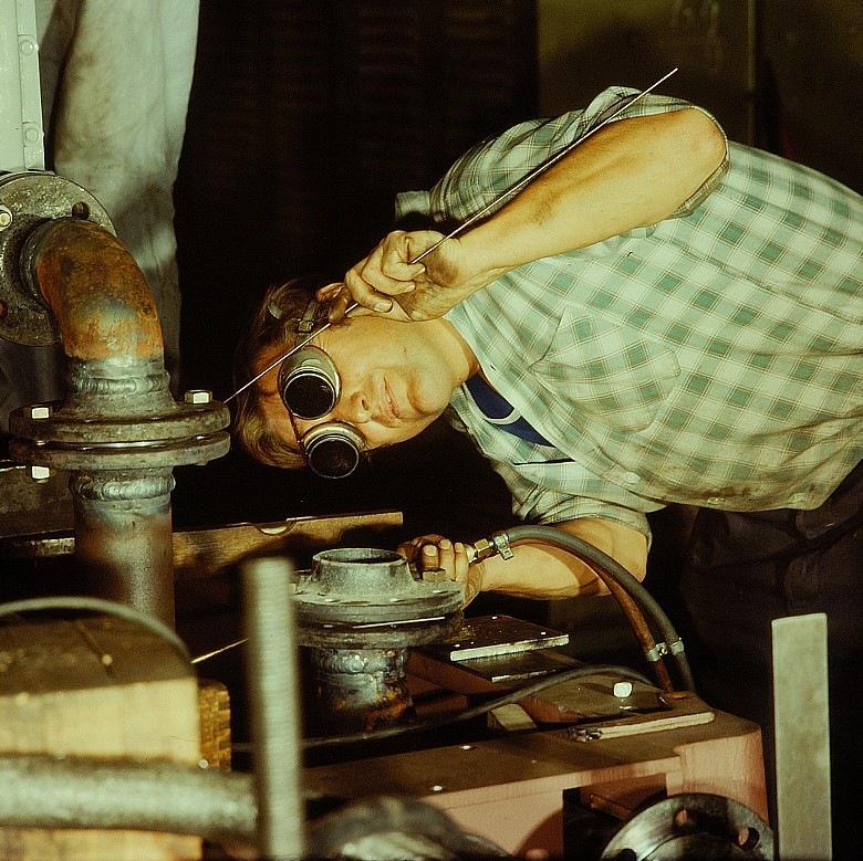 Original image description from the Deutsche FotothekSchlosser